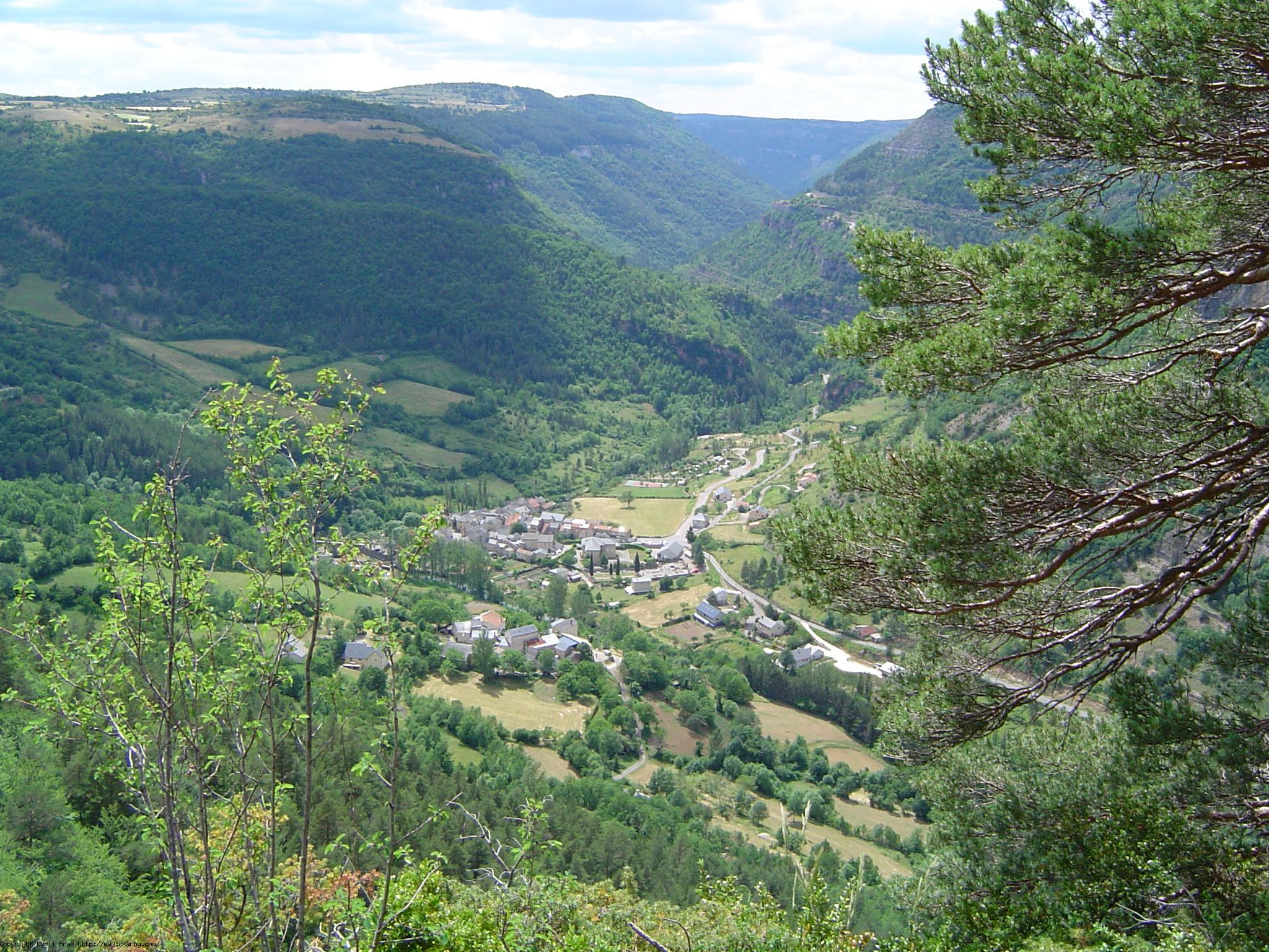 Le village français de Trèves dans le Gard 2005. Cevenol2